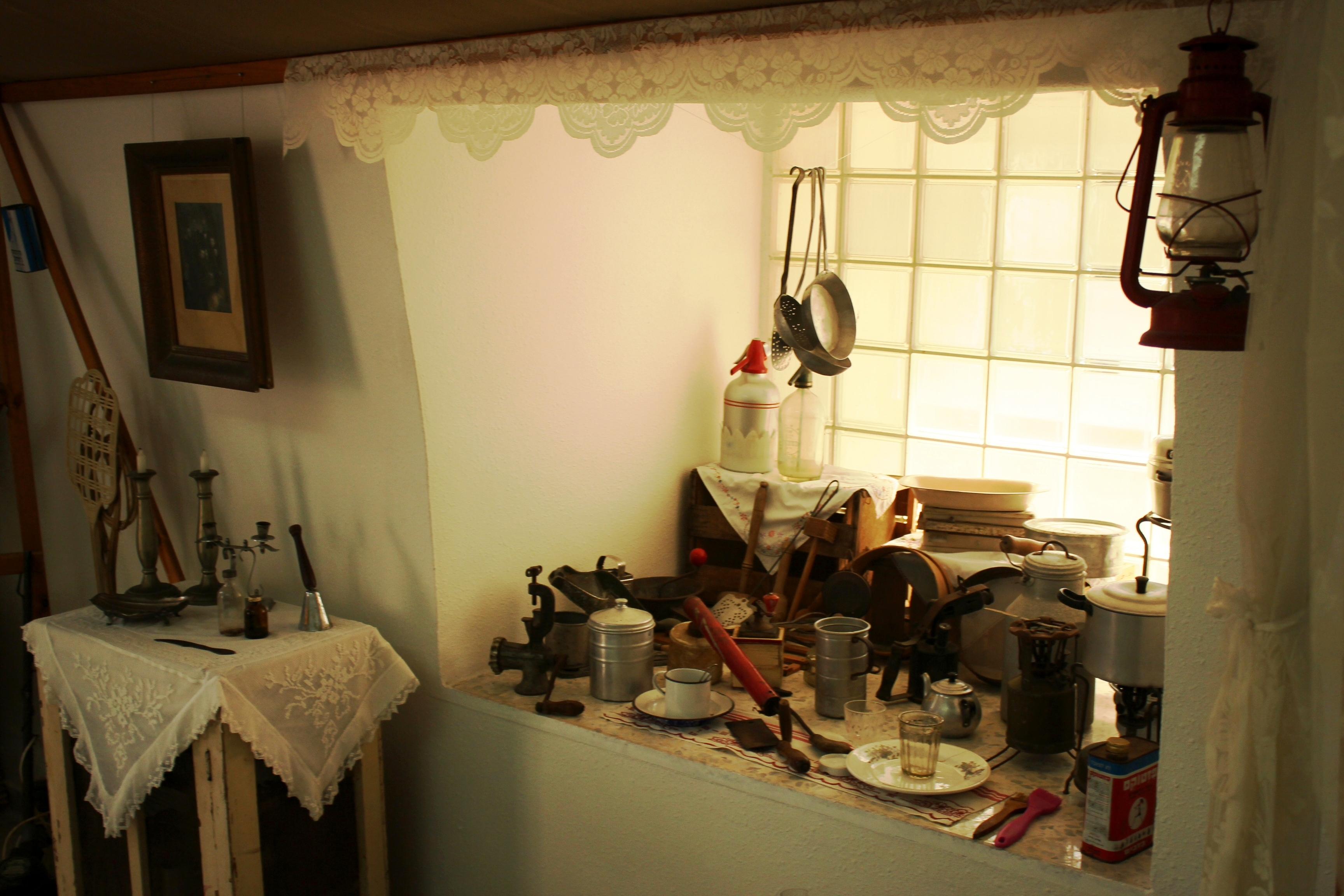 בית פישר בקרית אתא